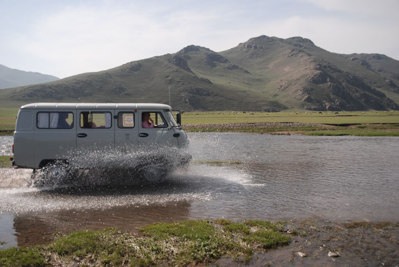 UAZ-452 minivan in Mongolia.